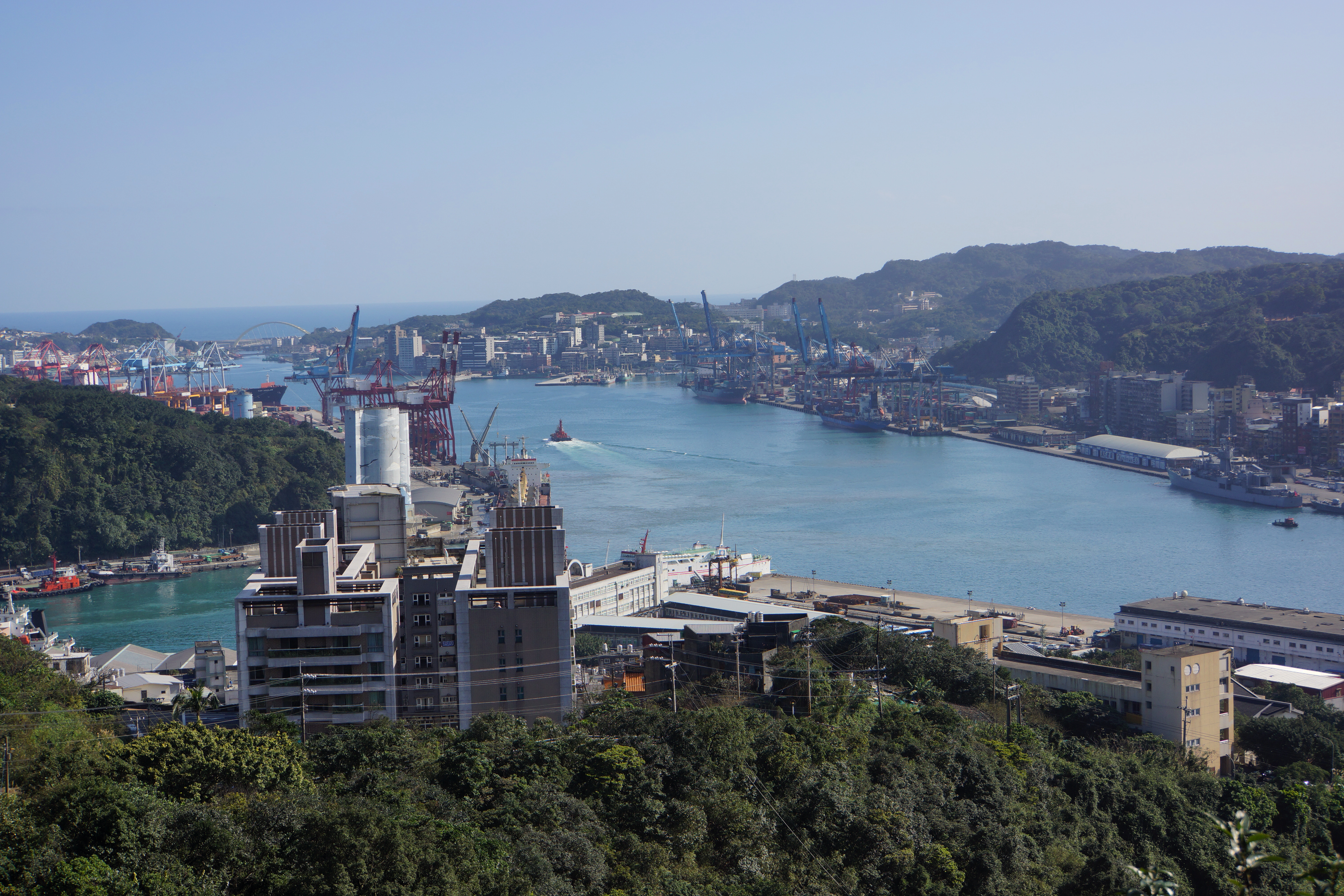 基隆港 Keelung Port